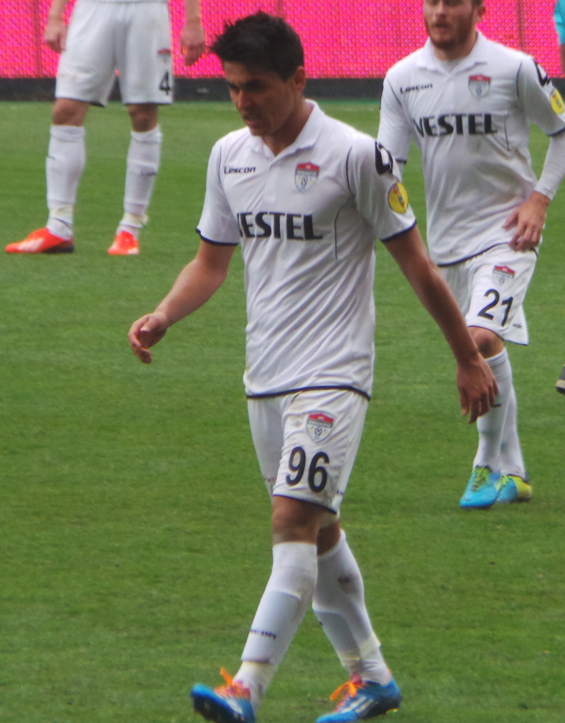 İsmail Köse